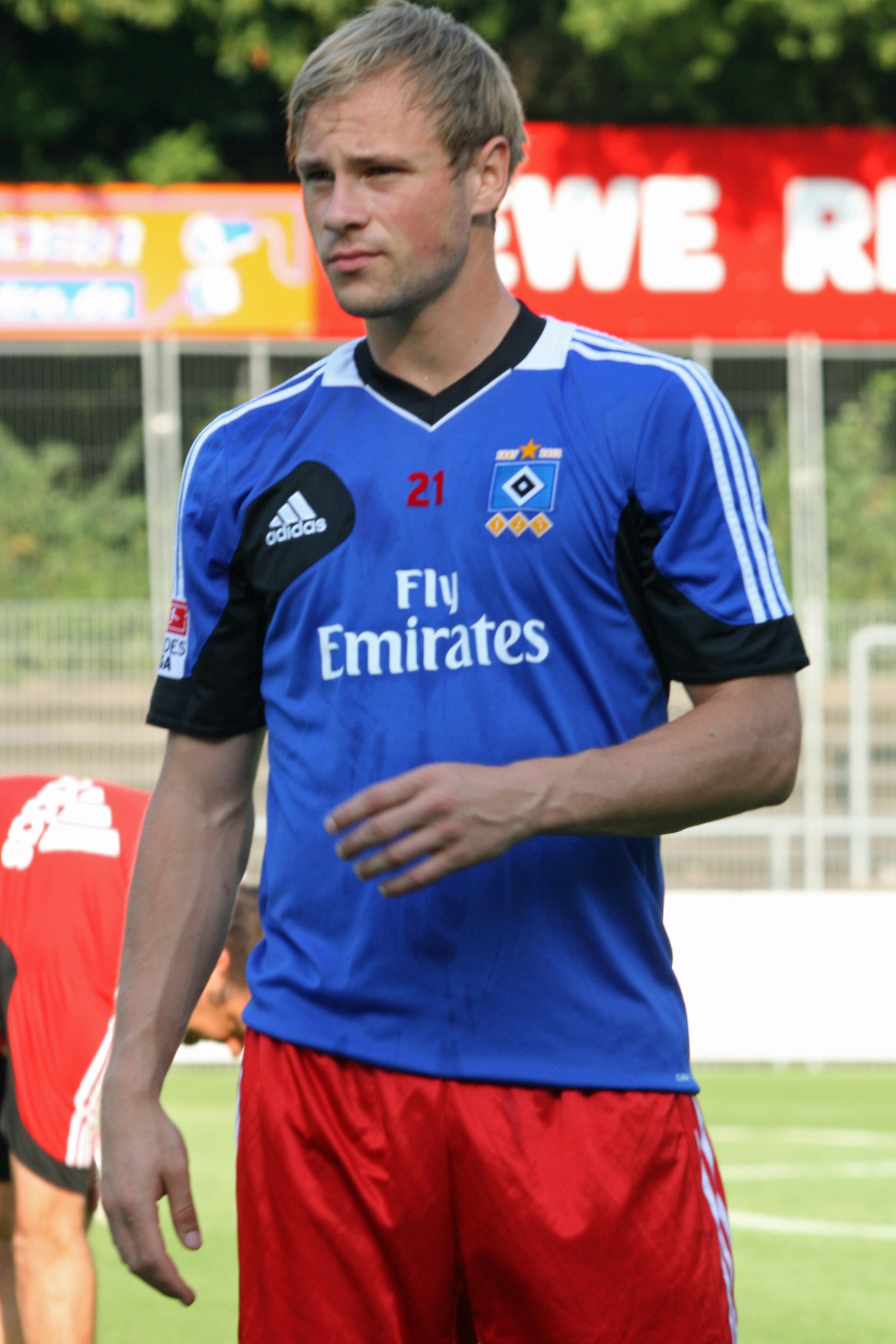 Maximilian Beister mit dem Hamburger SV beim Testspiel bei Eintracht Norderstedt / Juli 2012